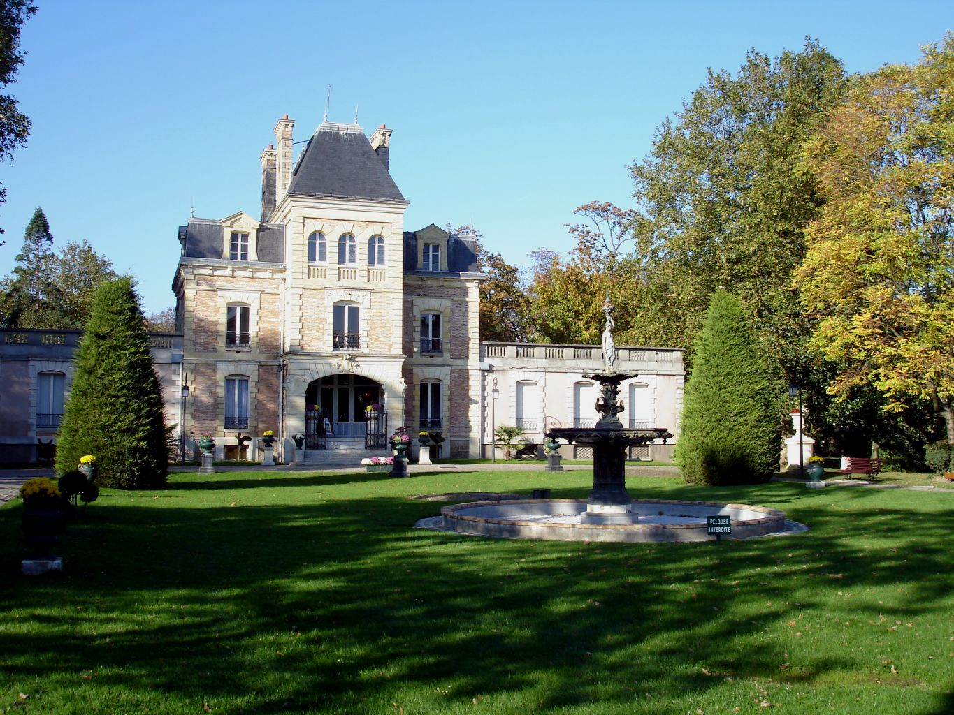 Château de la forêt (parc Lefèvre) à Livry-Gargan (France) - Novembre 2006 Photo personnelle de clicsouris